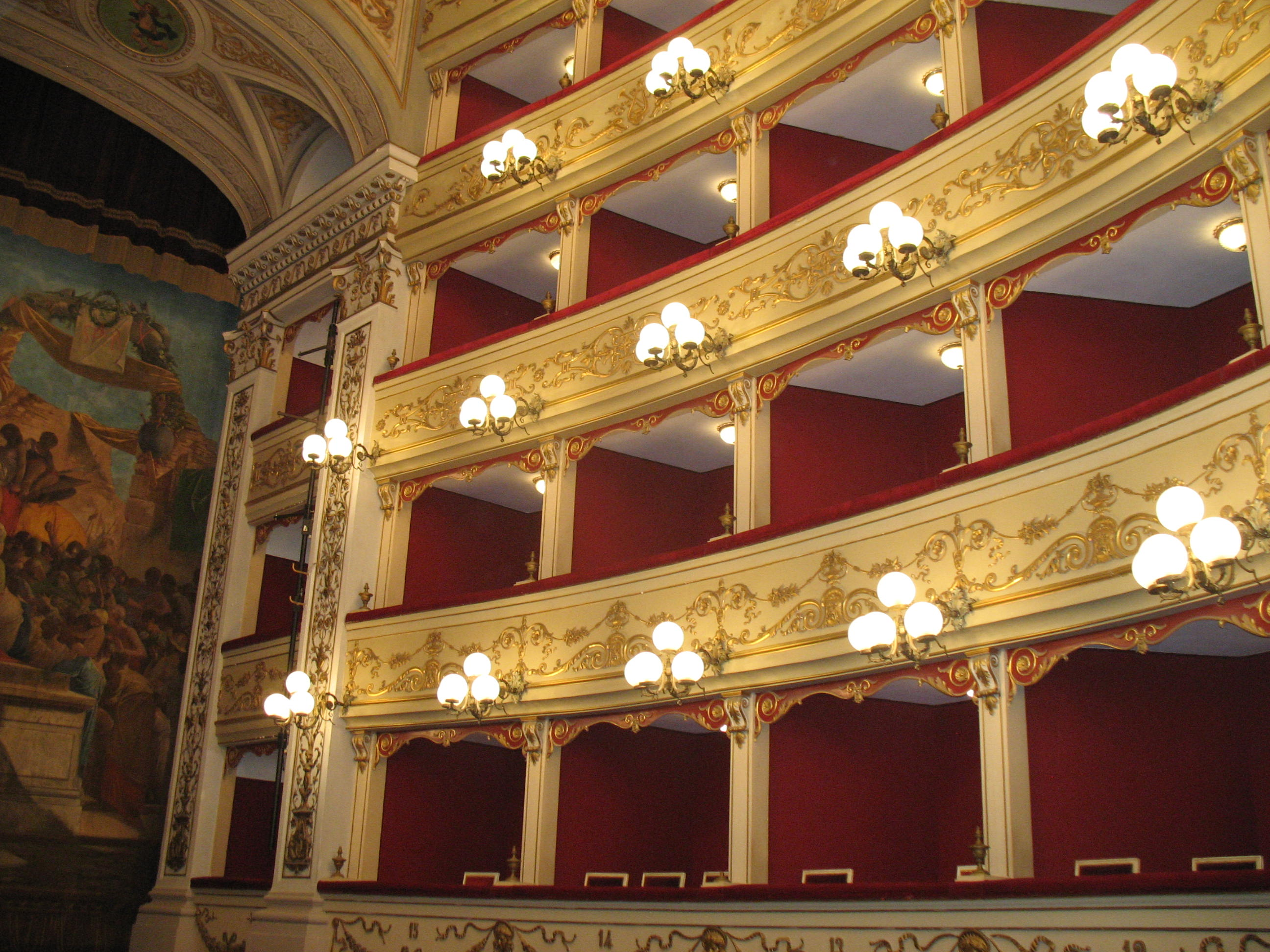 Spalti del Teatro Marrucino di Chieti, fotografati dalla platea